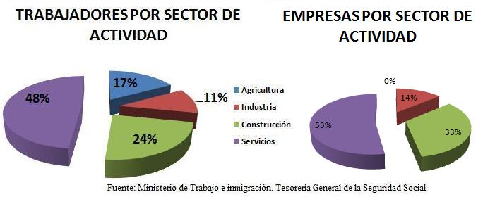 Gráfico explicatorio de la estructura productiva del municipio de Molinicos (Albacete)